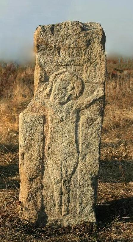 Таращанська "кам'яна баба": Таращанська "кам'яна баба"